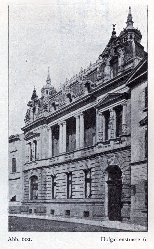 Haus Hofgartenstraße_6_Düsseldorf, Architekten "Boldt & Frings", erbaut in den 1880er Jahre